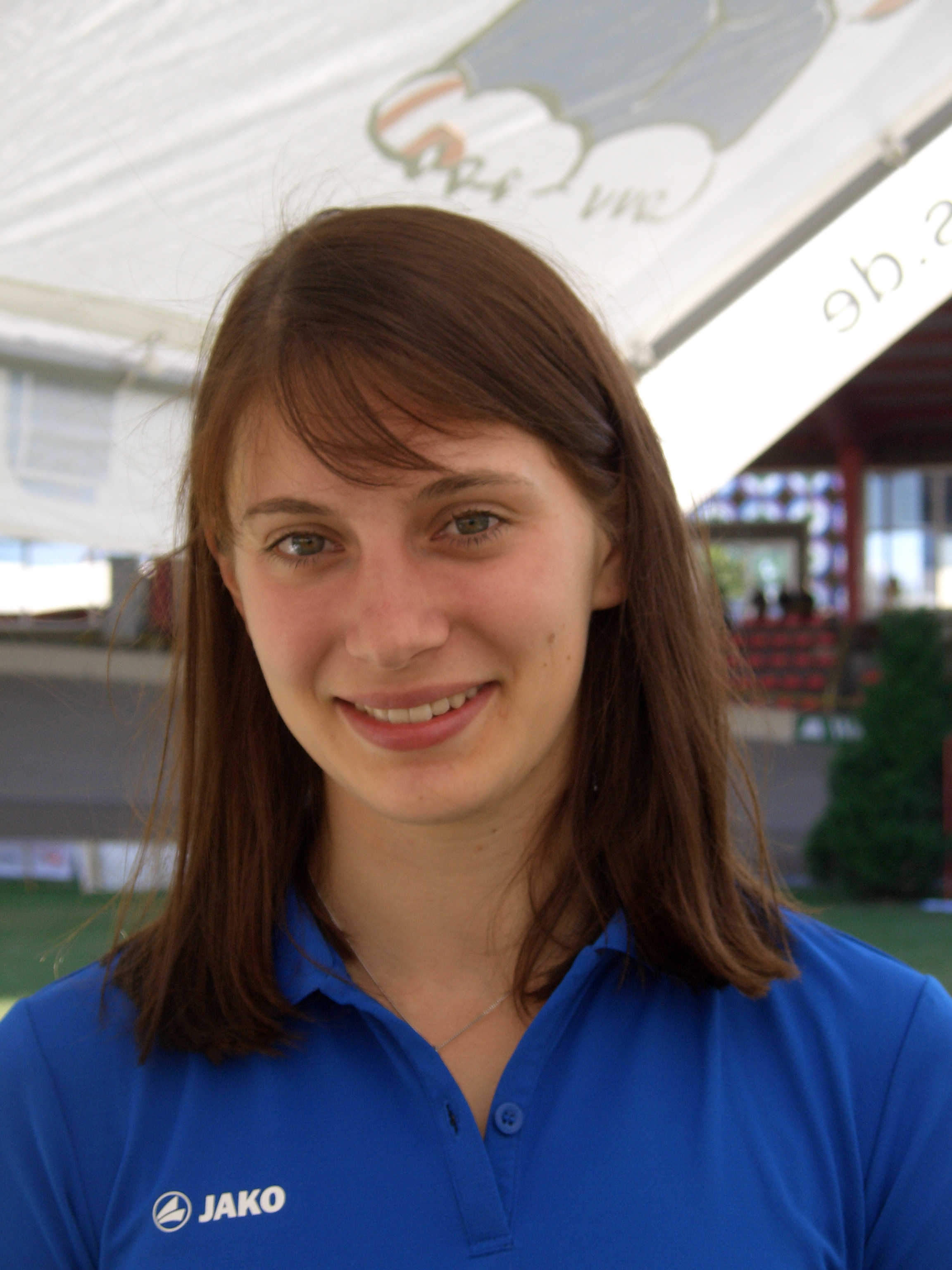 Miriam Welte, Radsportlerin